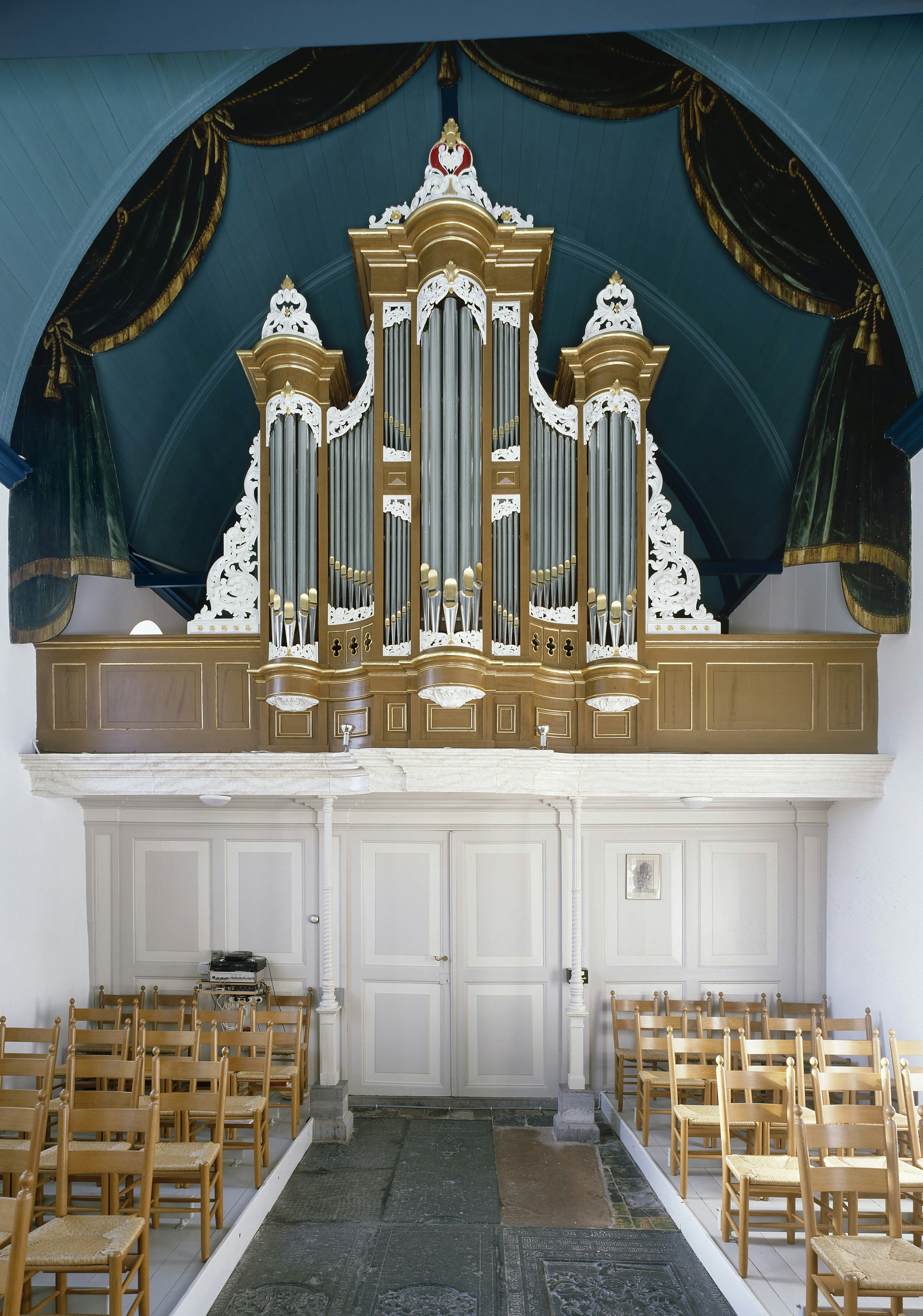 Nederlands Hervormde Kerk: Intenieur, aanzicht orgel, orgelnummer 683 (opmerking: Gefotografeerd voor Het Historische Orgel in Nederland 1872-1878, bladzijde 230)